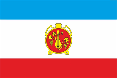 Прапор села Городнє (Болградський район)